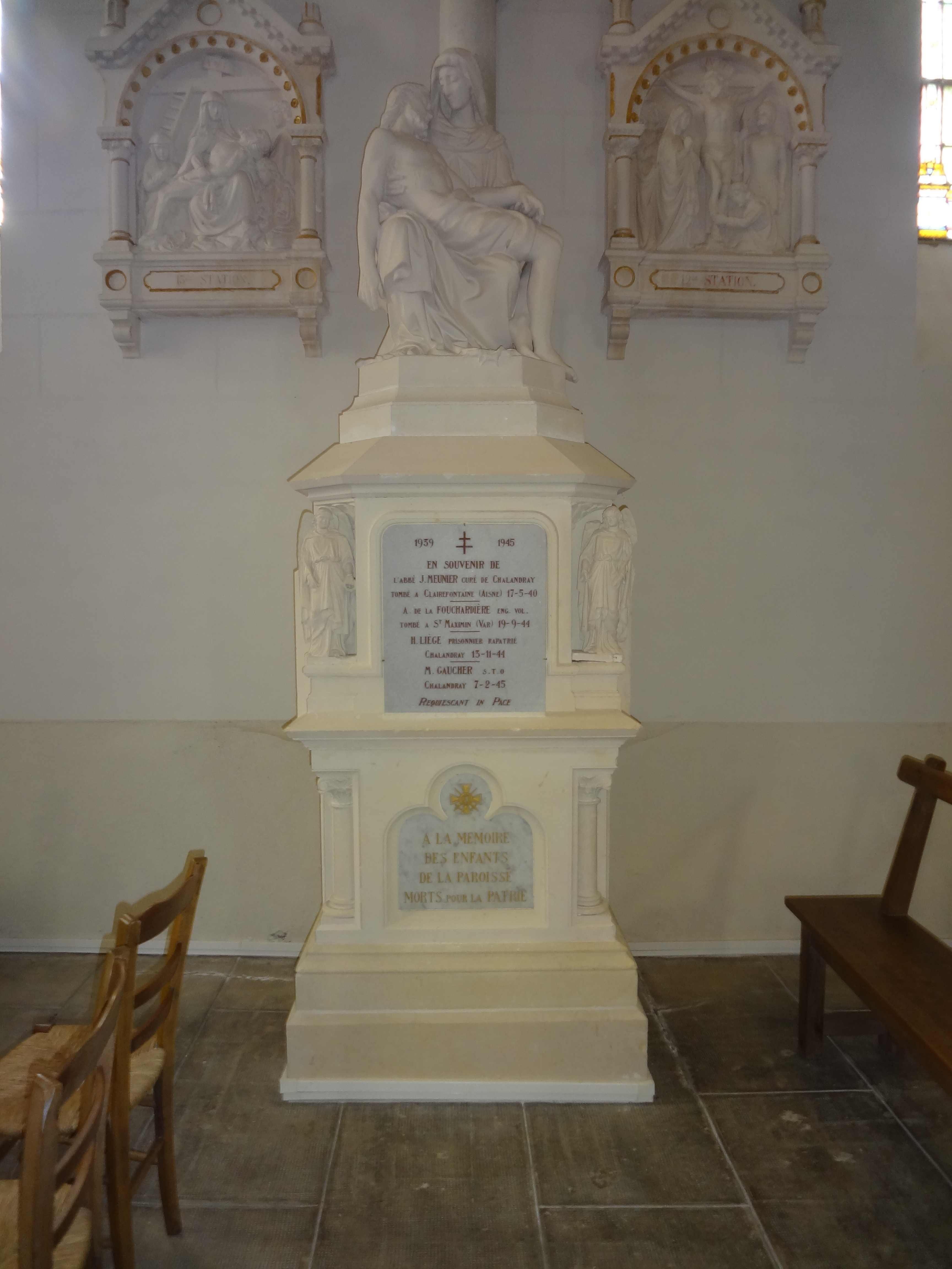 Le monument est orné d'une Pieta, thème universel de la Mater dolorosa